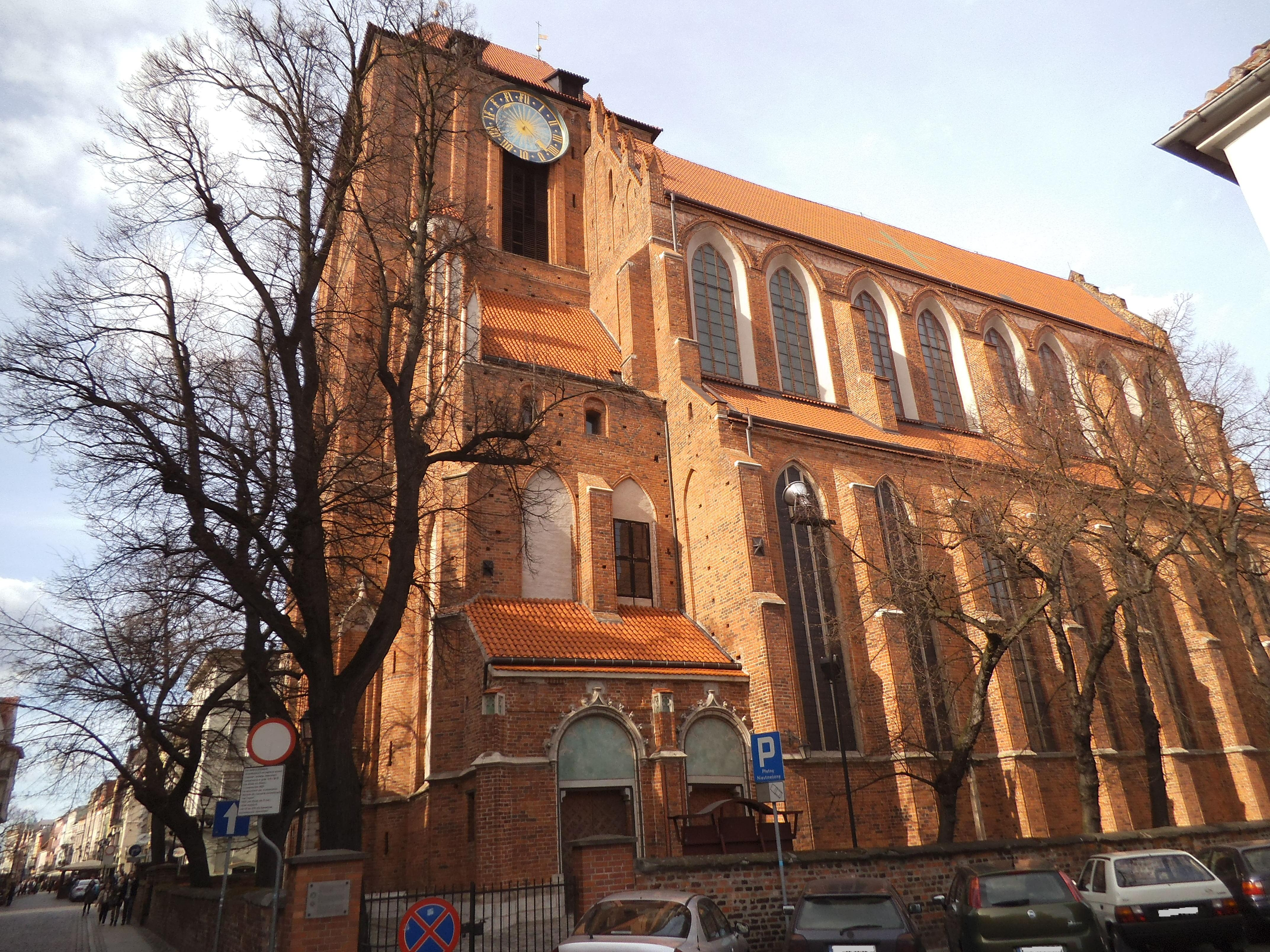 Katedra w Toruniu